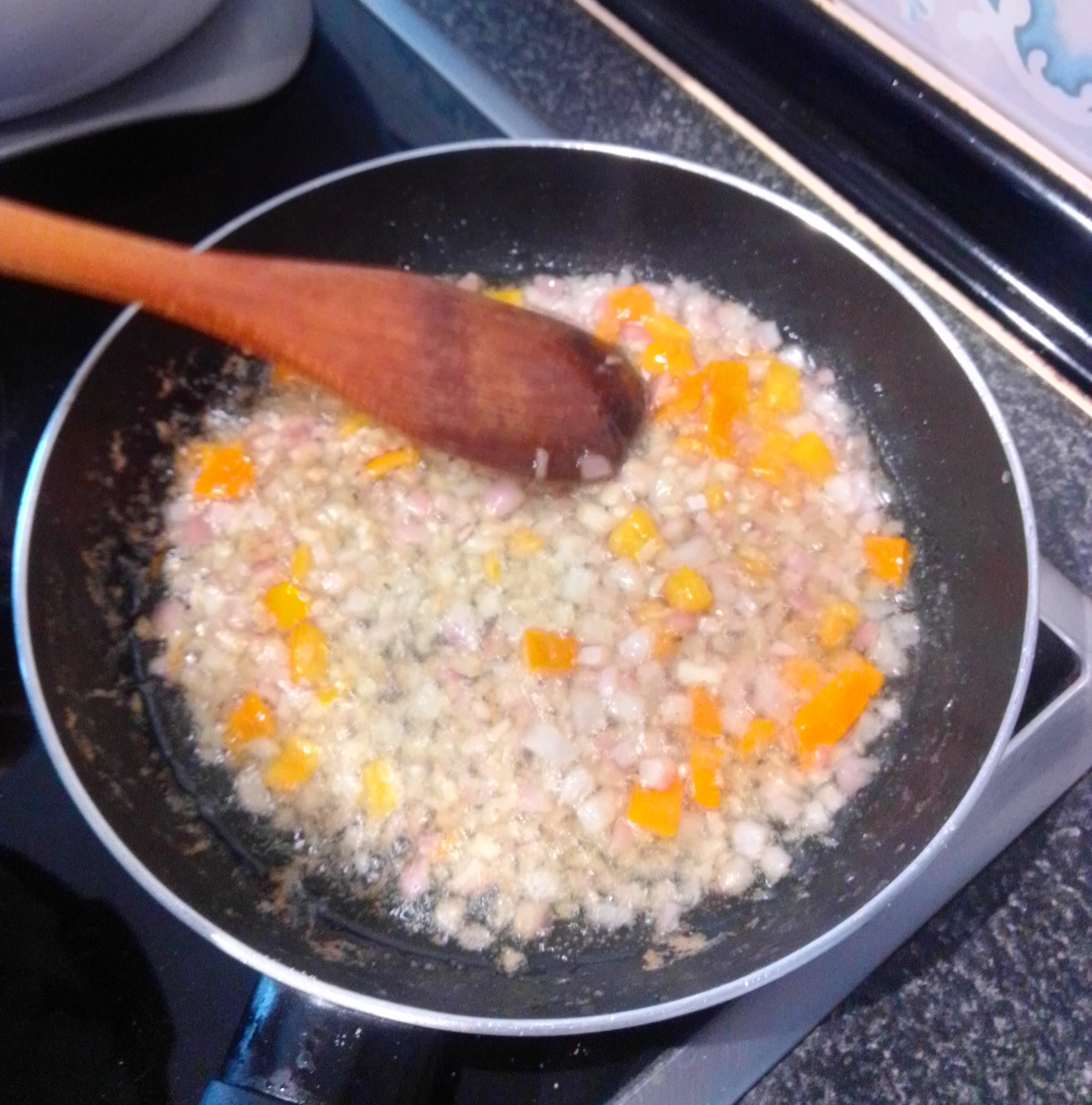 Aderezo peruano para el espesado chiclayano